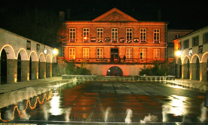 Français